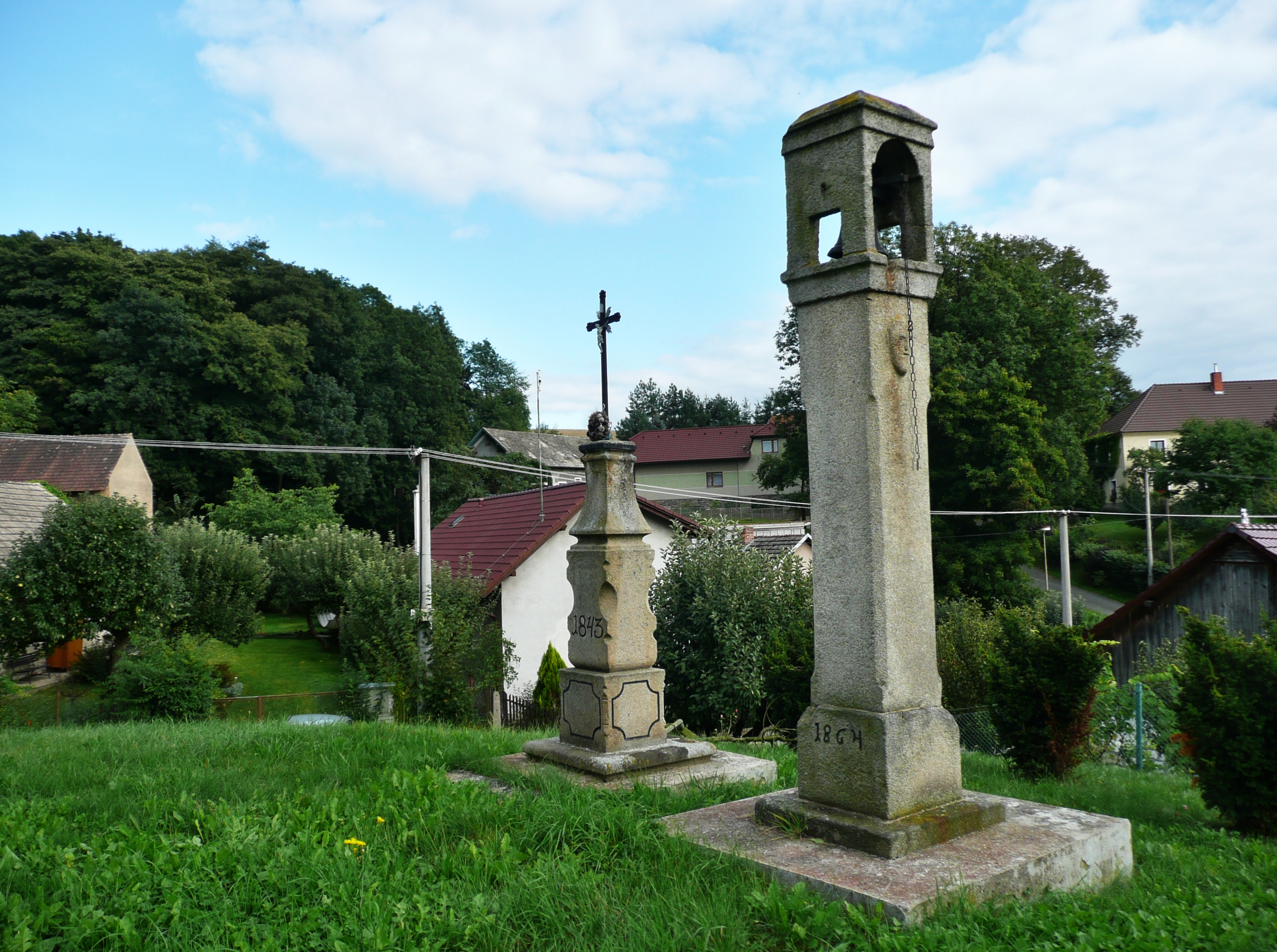 Zvonička a kříž (Onšovec), Onšovec